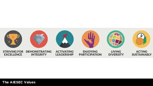 our values